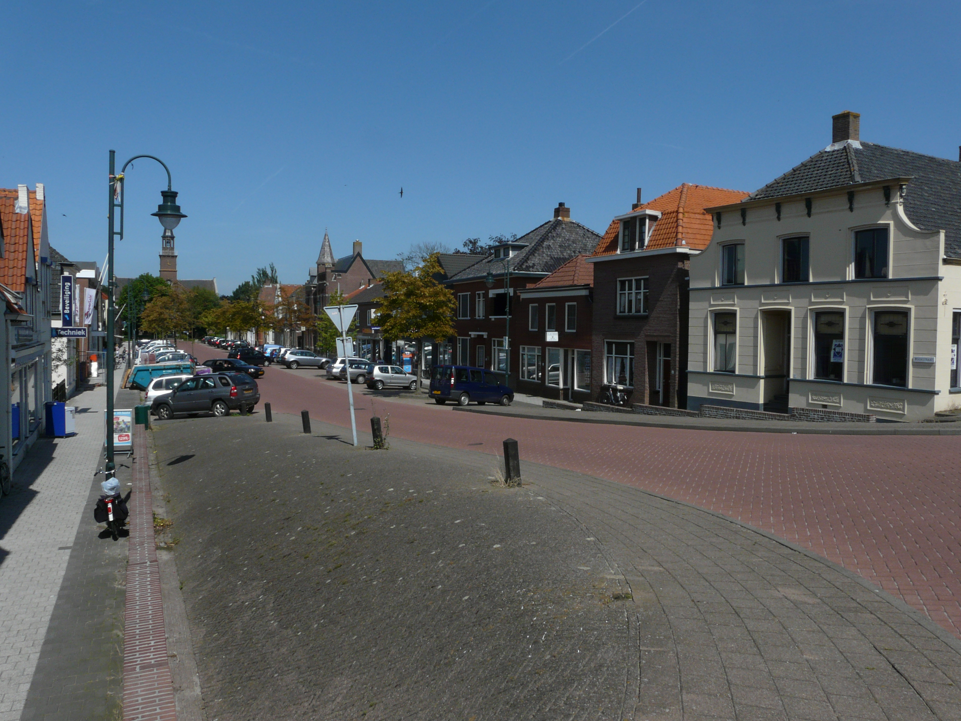 Zicht op een deel van de Voorstraat in Fijnaart